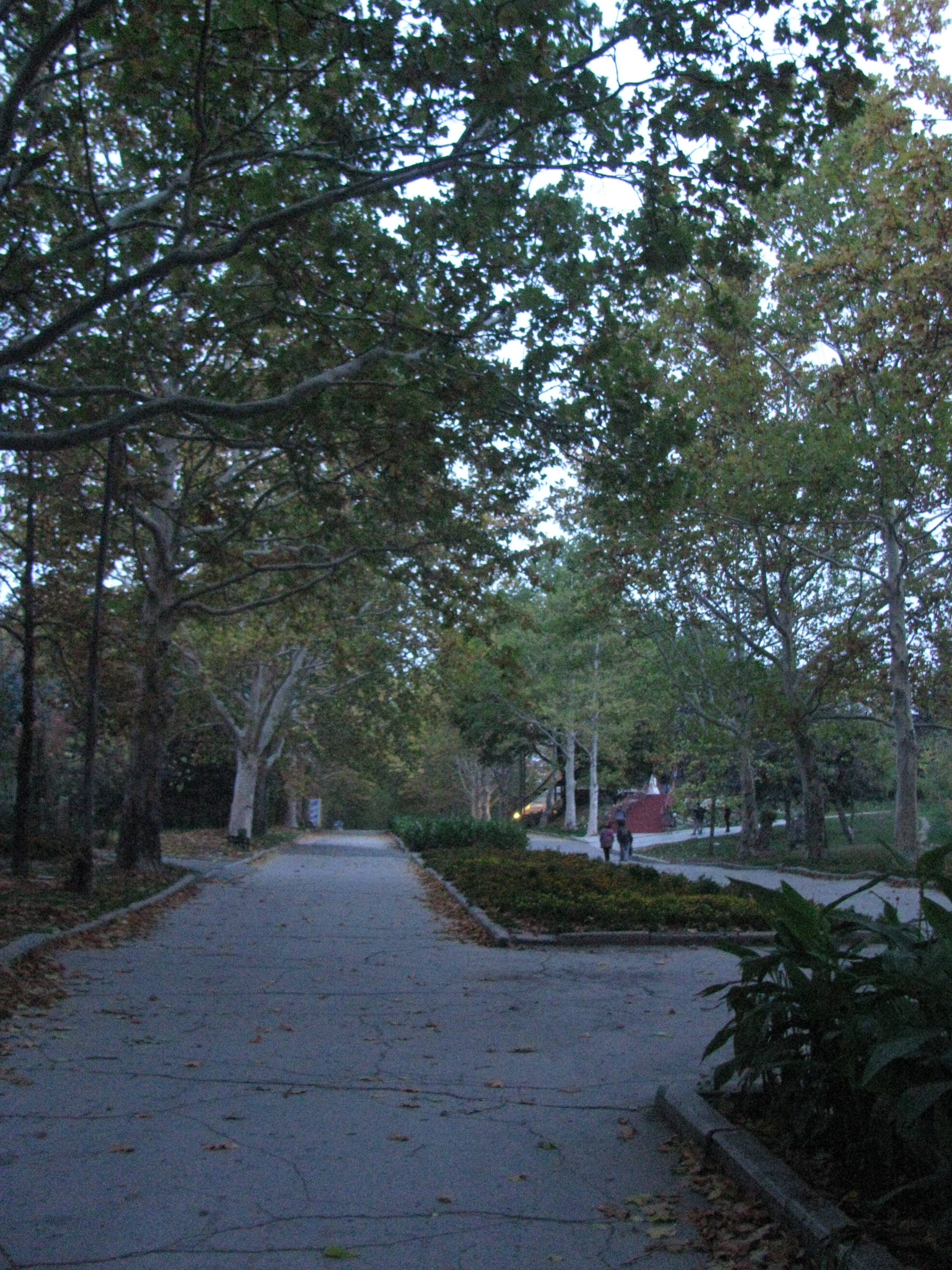 Alee Trandafiilor văzută de jos